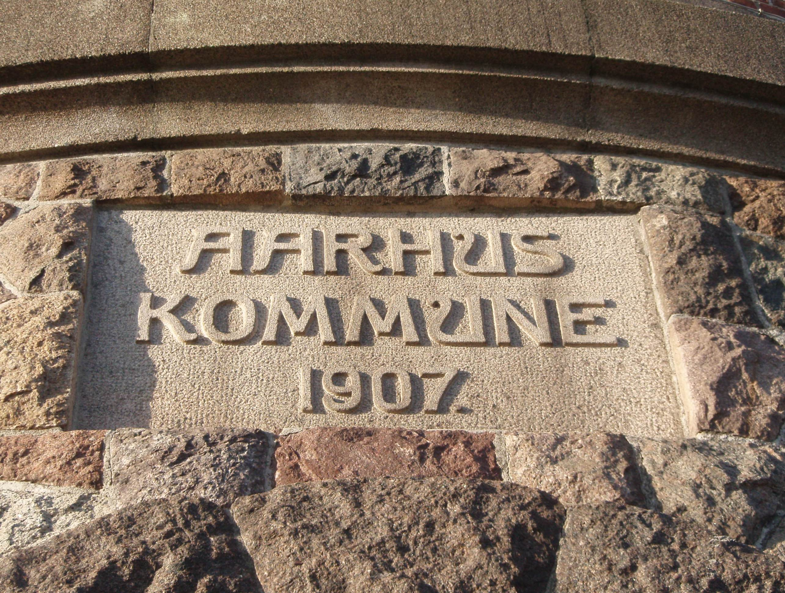 Skilt med bygningsår.